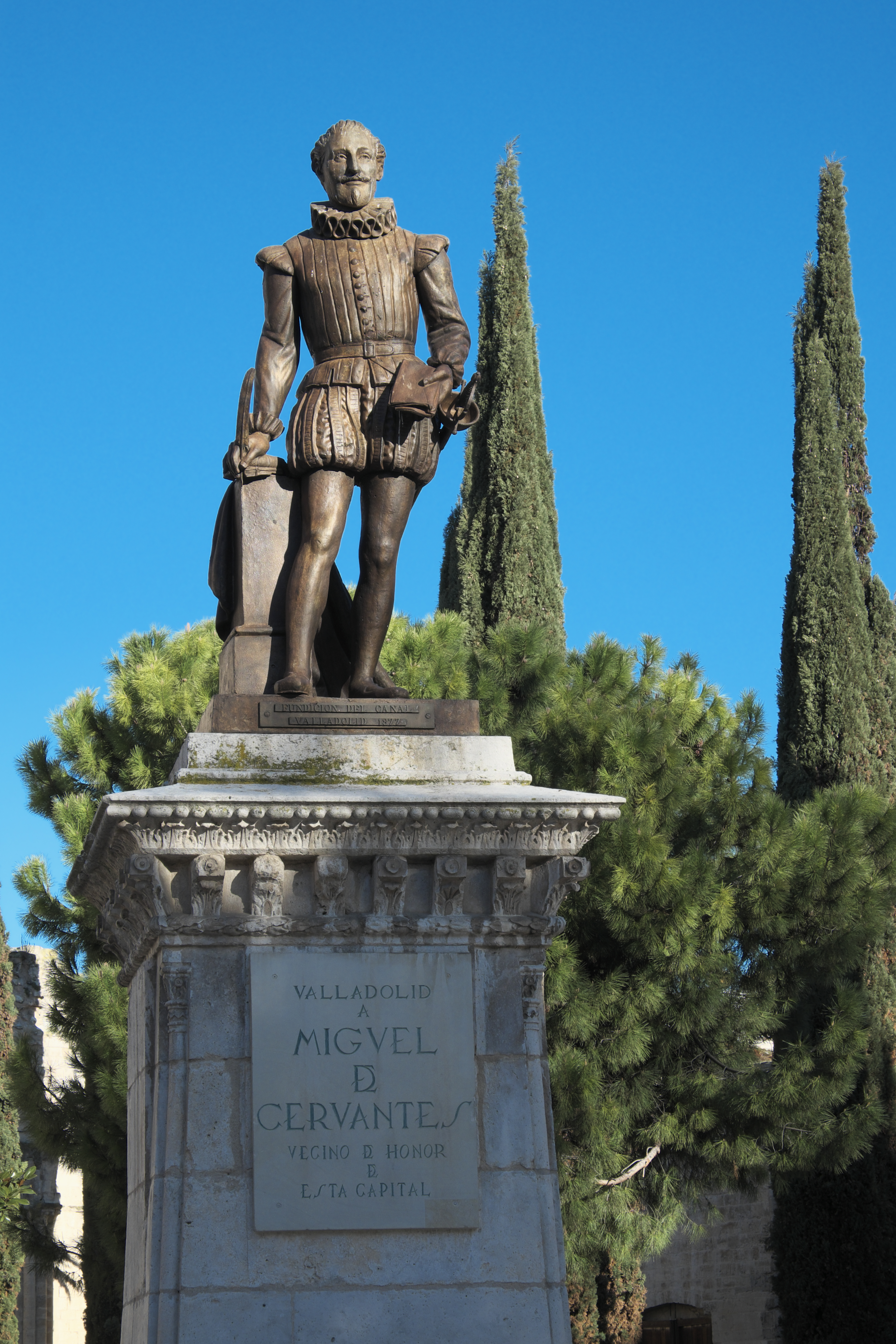 Monument für Miguel de Cervantes an der Plaza de la Universidad in Valladolid (Kastilien und León/Spanien)